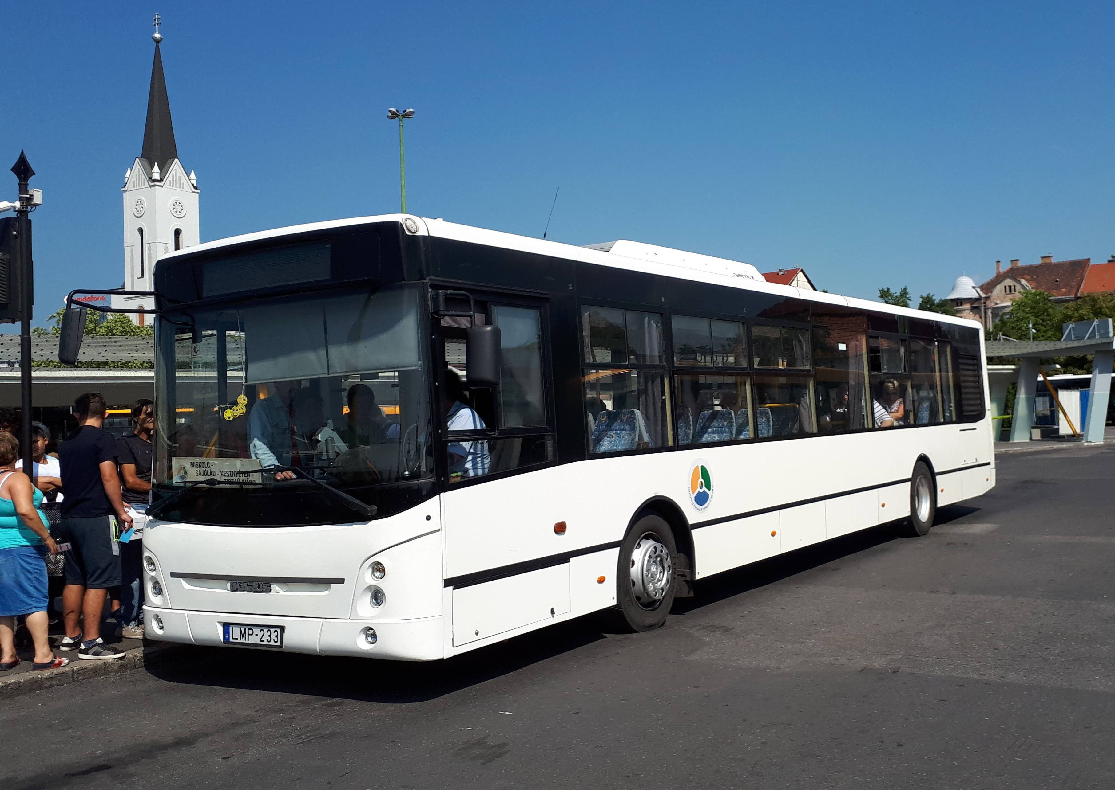 Az ÉMKK LMP-233 rendszámú Ikarus-ARC E127 típusú busza Miskolcon, a 3733-as helyközi járaton.